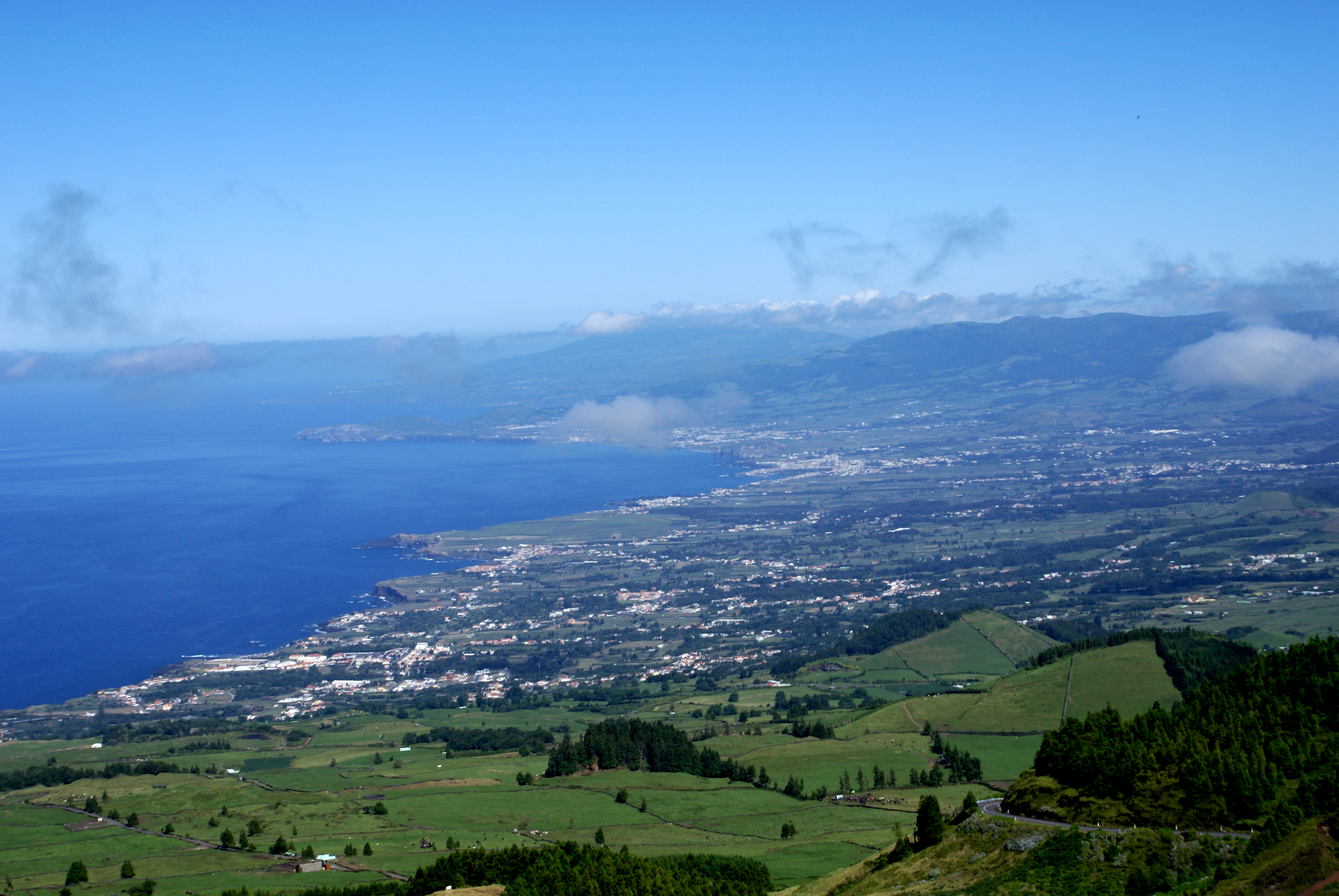 Miradouro do Paul, Feteiras, Ponta Delgada, ilha de São Miguel, Açores